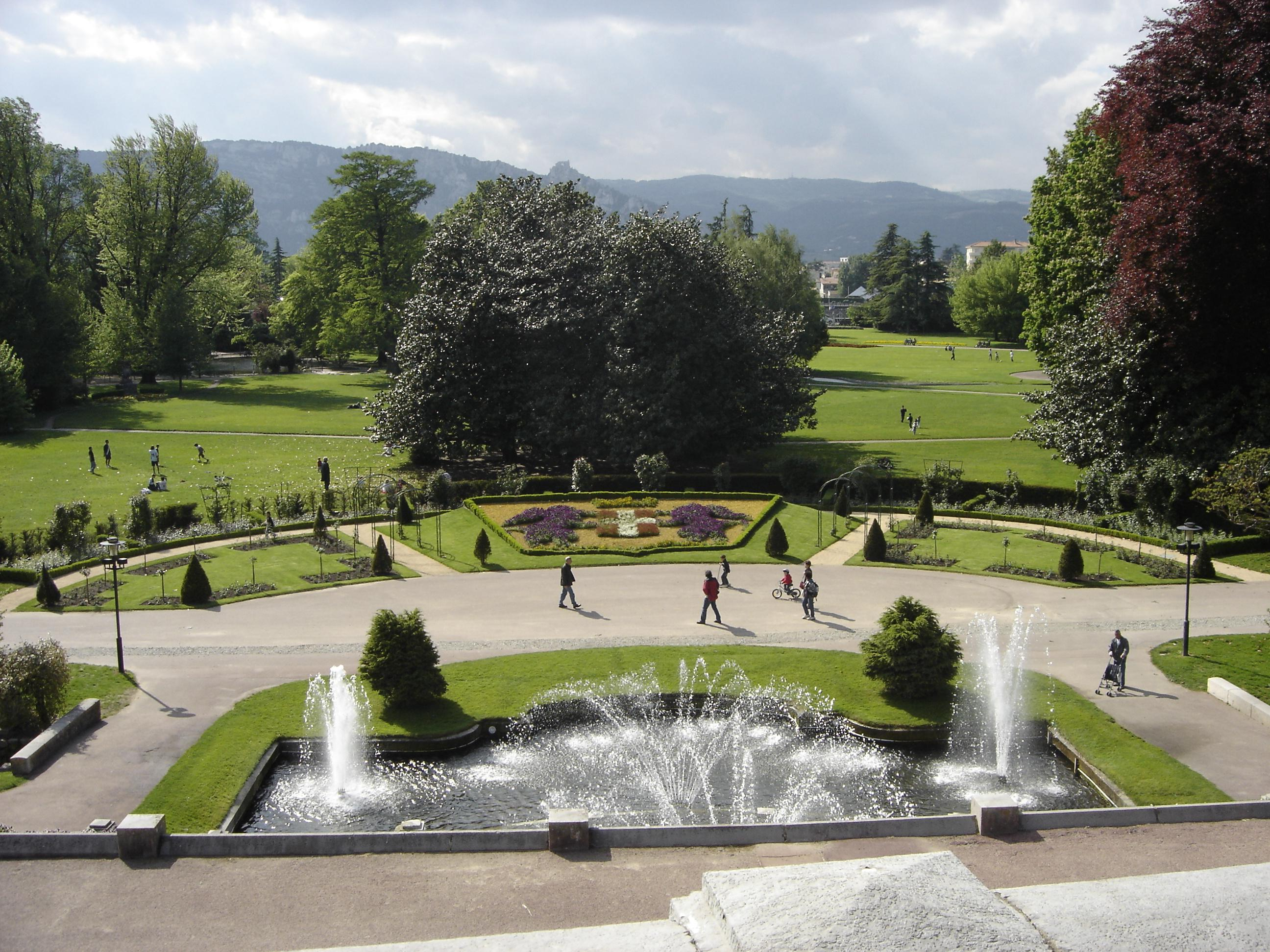 Parc Jouvet à Valence pris depuis l'escalier principal près du kiosque Penet